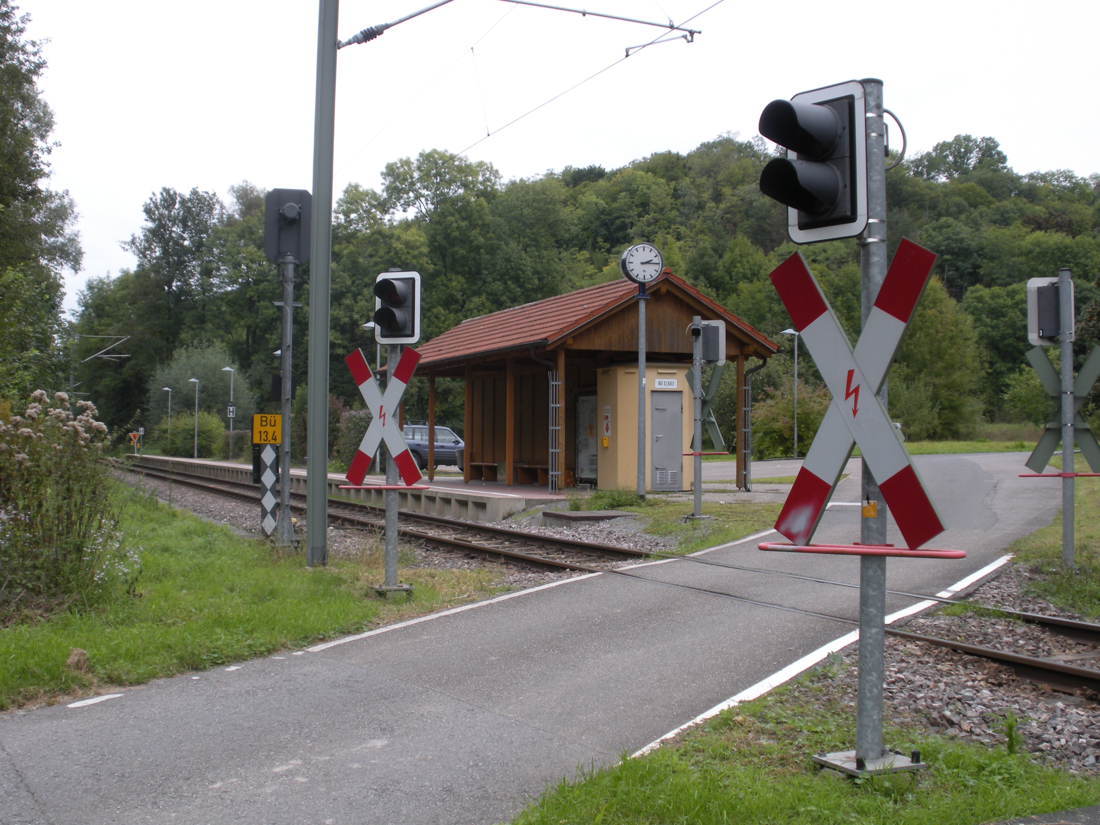 Stadtbahnhaltestelle mit Bahnübergang in Bahnbrücken, Stadt Kraichtal - Stadtbahn Karlsruhe